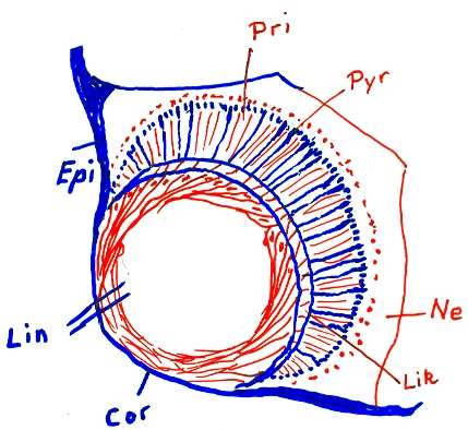 Auge der Qualle (eine Cubomeduse) Carybdea marsupialis als Beispiel für ein einfaches Linsenauge